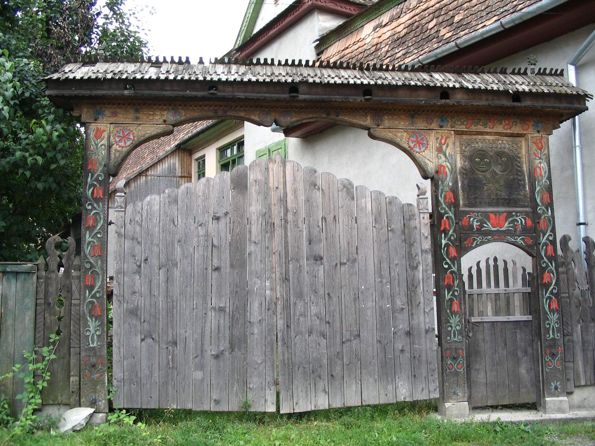 Poartă secuiască din Praid.